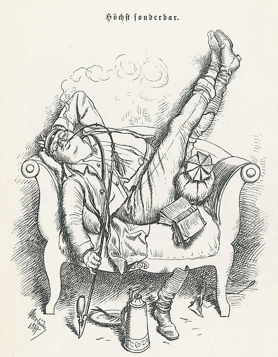 "Höchst sonderbar", Karikatur von Adolf Oberländer (1845-1923), 1884.